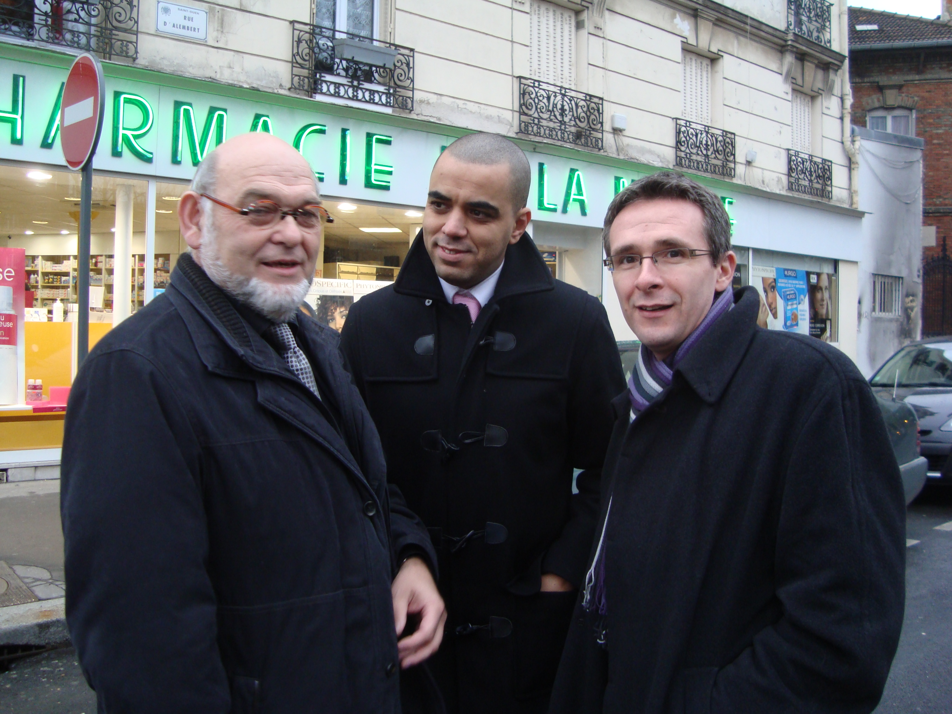 Le sénateur MUP avec le vice-président du Conseil général de Seine-Saint-Denis Stéphane Troussel apportant leur soutien à la candidature d'Abdelhak Kachouri aux régionales 2010.